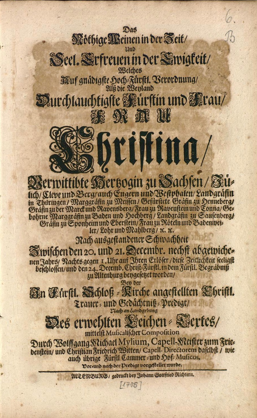 Titelblatt Trauermusik Christina von Sachsen-Coburg-Altenburg 1706 von Wolfgang Michael Mylius